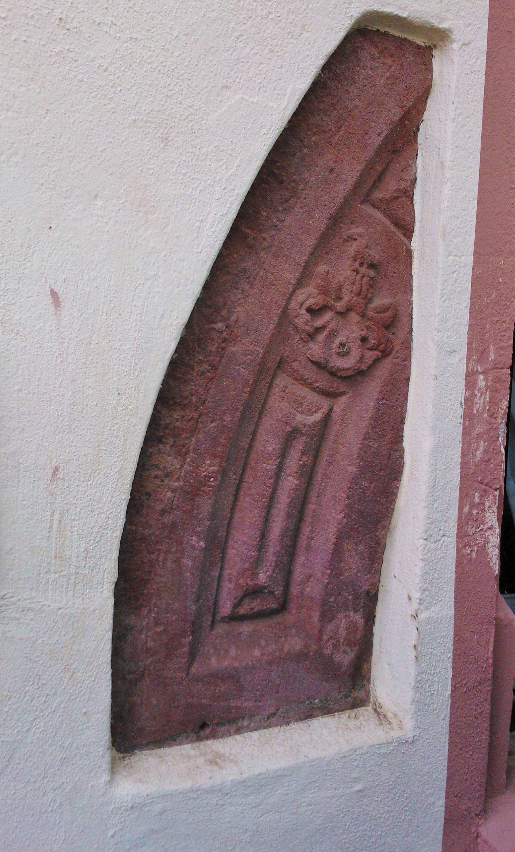 St. Josephshaus in Klein-Zimmern, ehemalige Wasserburg. Portalbogen mit Helmzier Gans von Otzberg, Westflügel, Innenhof